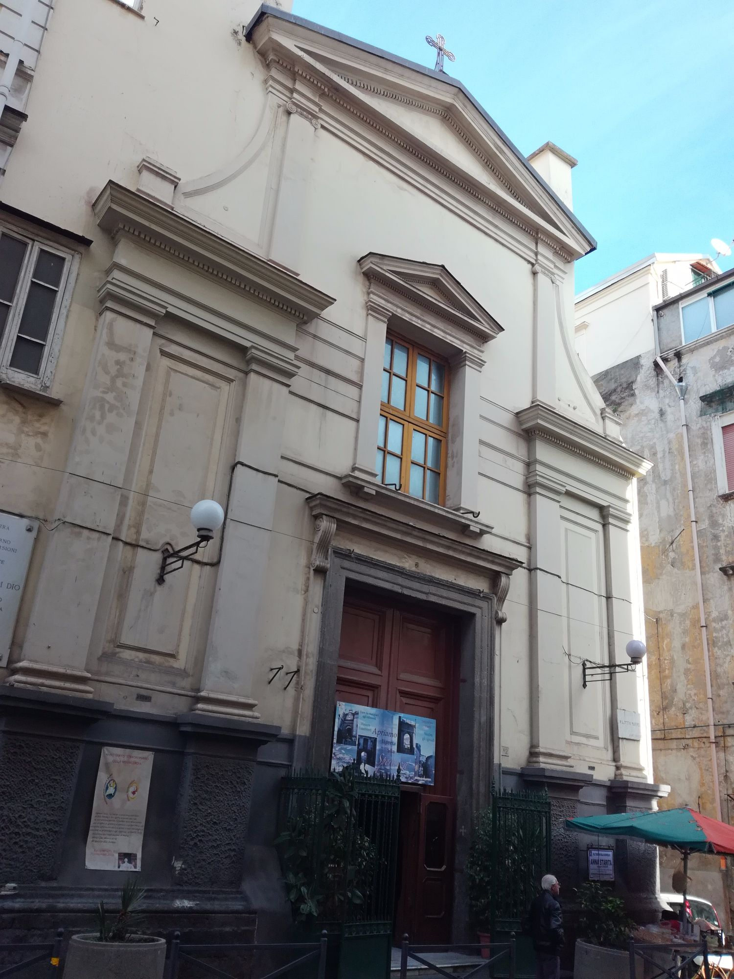 Esterno della chiesa di Santa Maria di Materdei (Napoli)